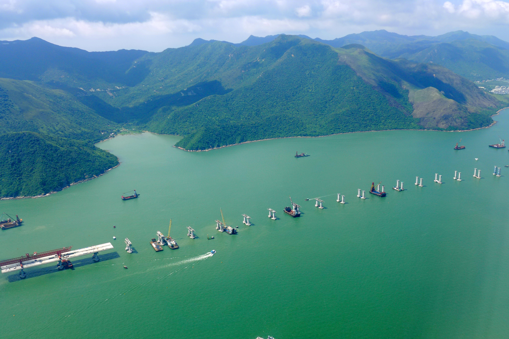 Hong Kong-Zhuhai-Macau Bridge Site